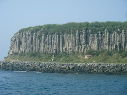 中文（台灣）: 澎湖縣桶盤嶼柱狀玄武岩。